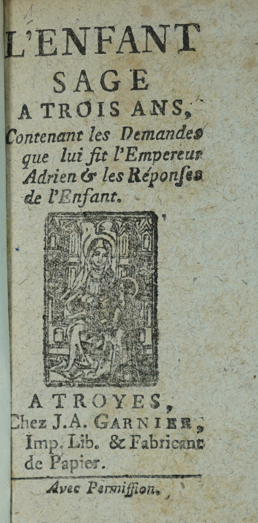 extrait du livre.